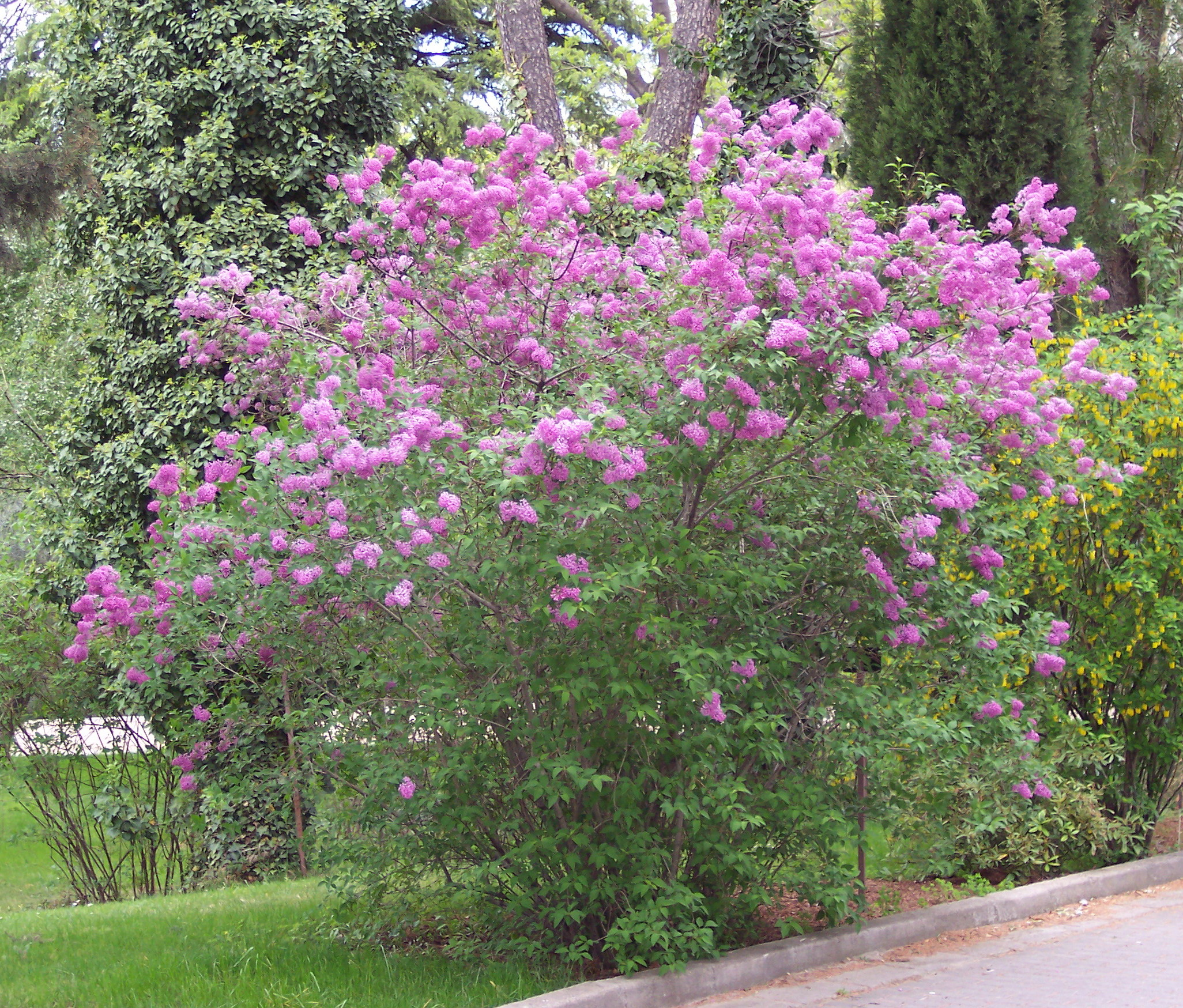 Syringa × chinensis, S. persica × vulgaris. Real Jardín Botánico de Madrid.